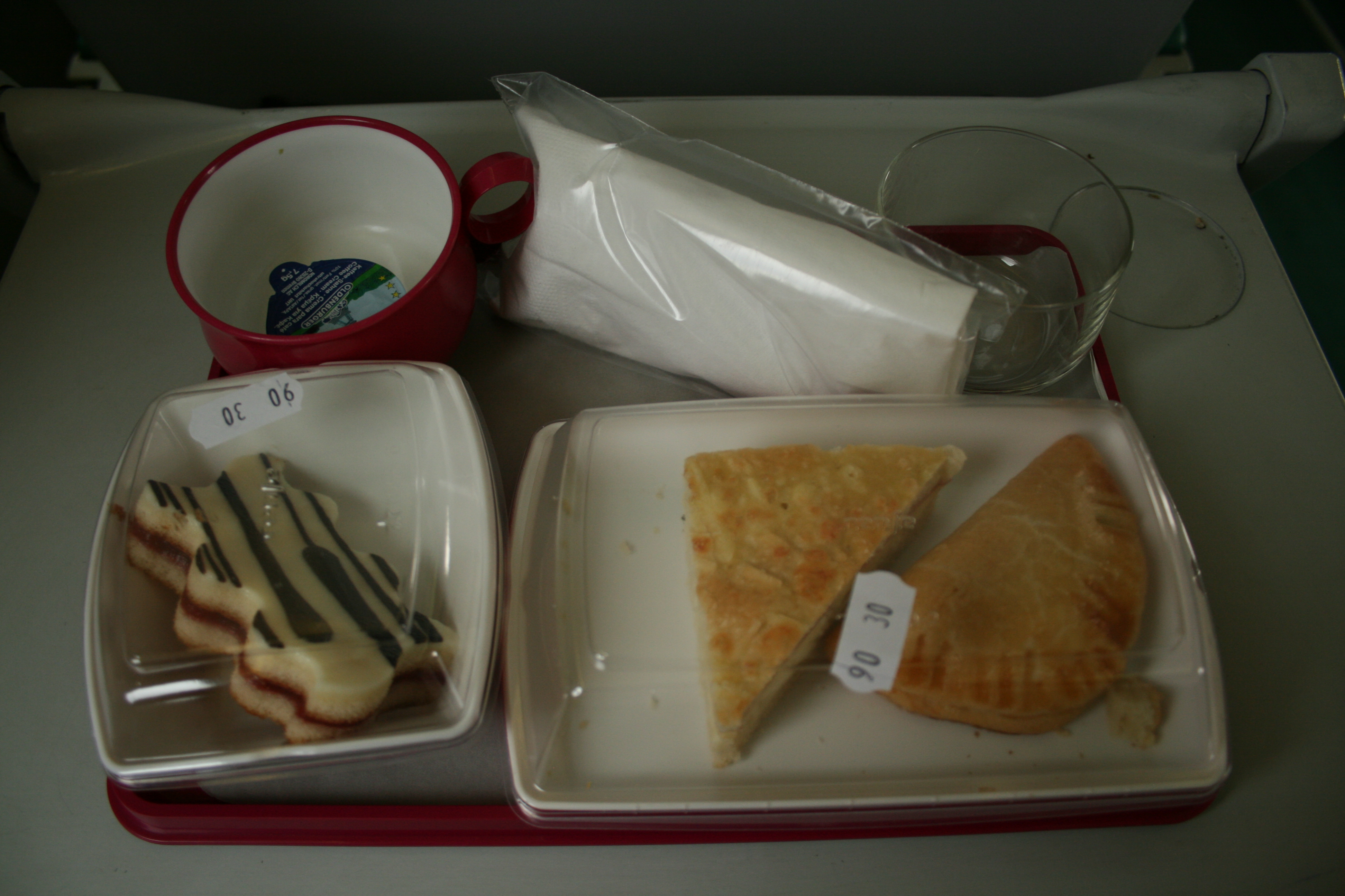 Menú de prefernte en un Alaris español - Taza vacía con un paquete de leche - cubertería- vaso- pastel moldeado de frambuesa - dos empanadas (queso y carne)